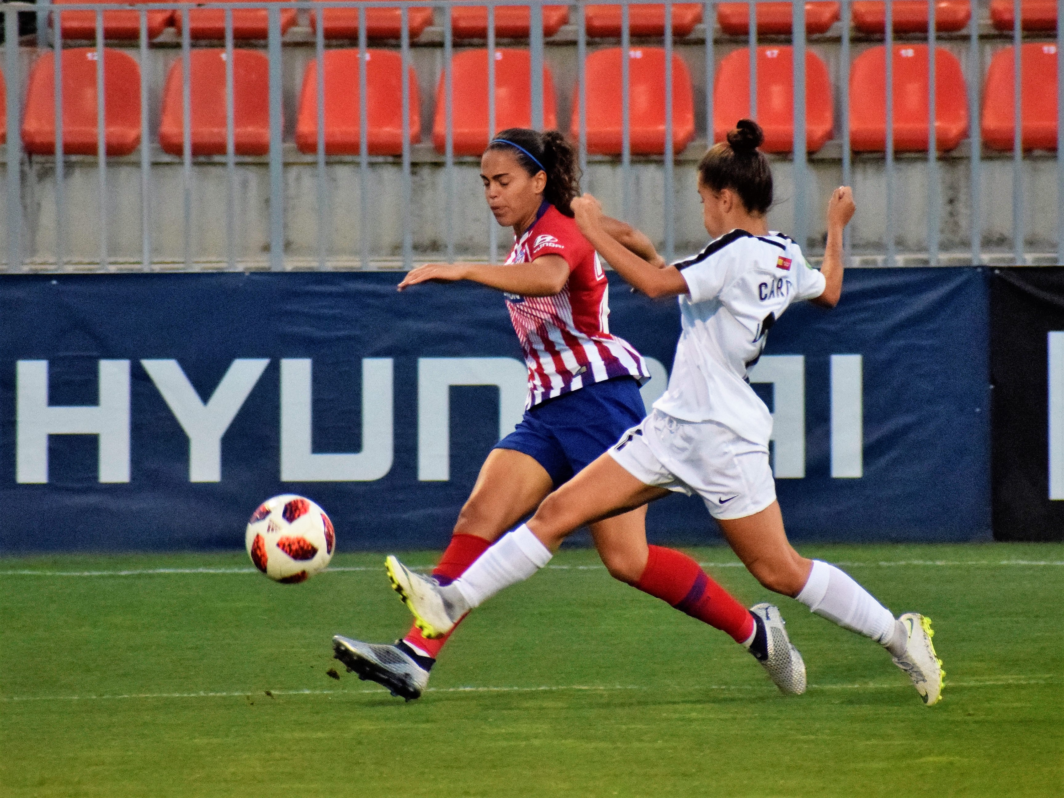 Andrea Sánchez Falcón jugando con el Atlético de Madrid